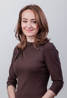 Susana Zapke